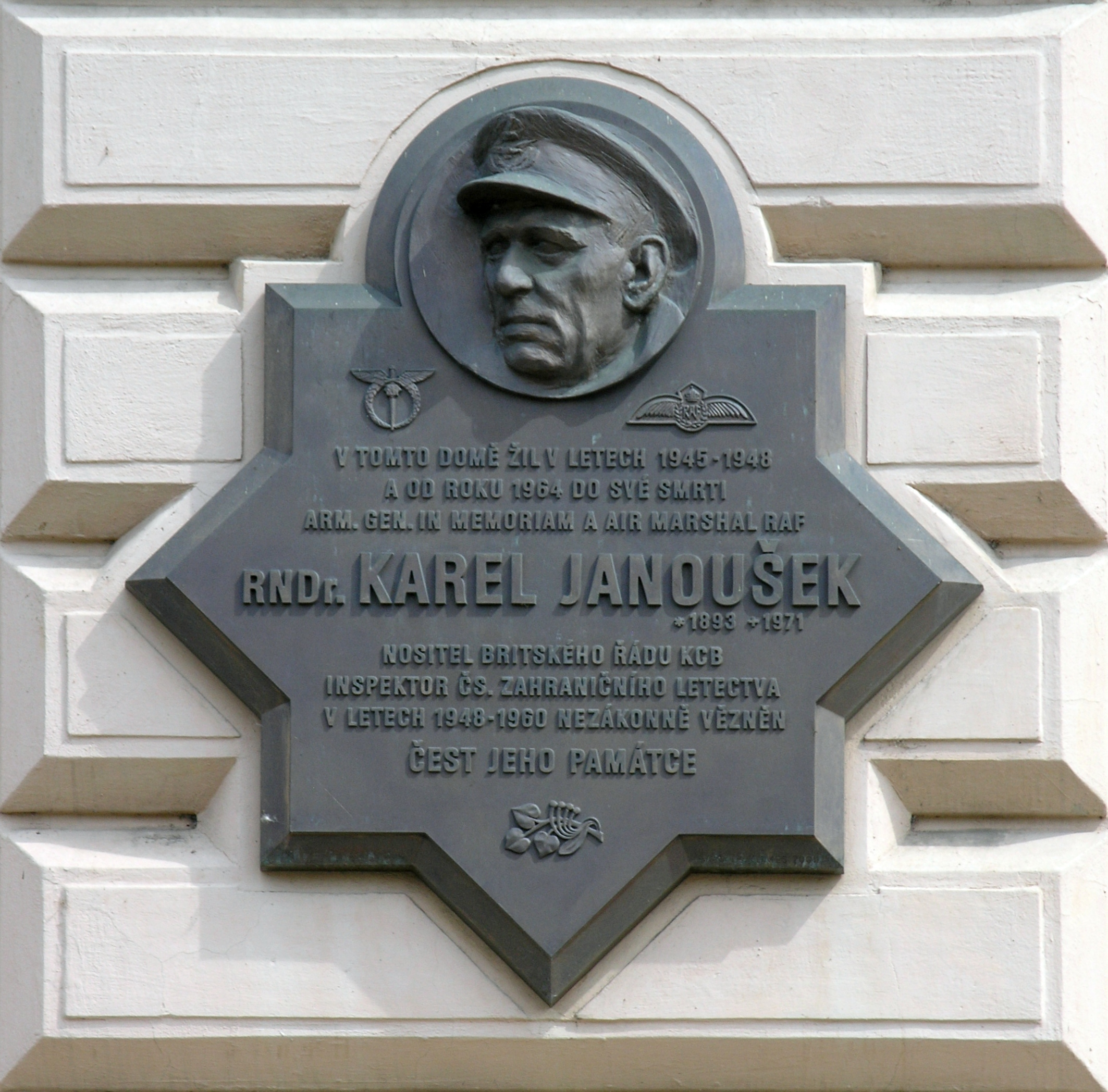 Pamětní deska maršála RnDR Karla Janouška v Praze na Malé Straně v ulici U Železné lávky